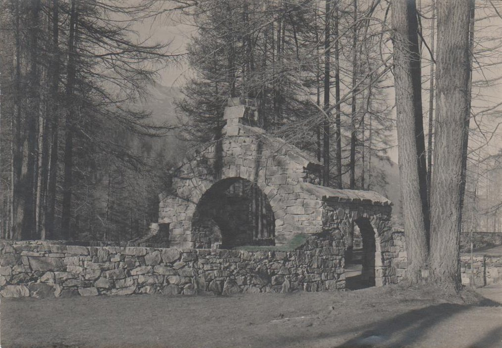 Eingangstor Waldfriedhof Davos